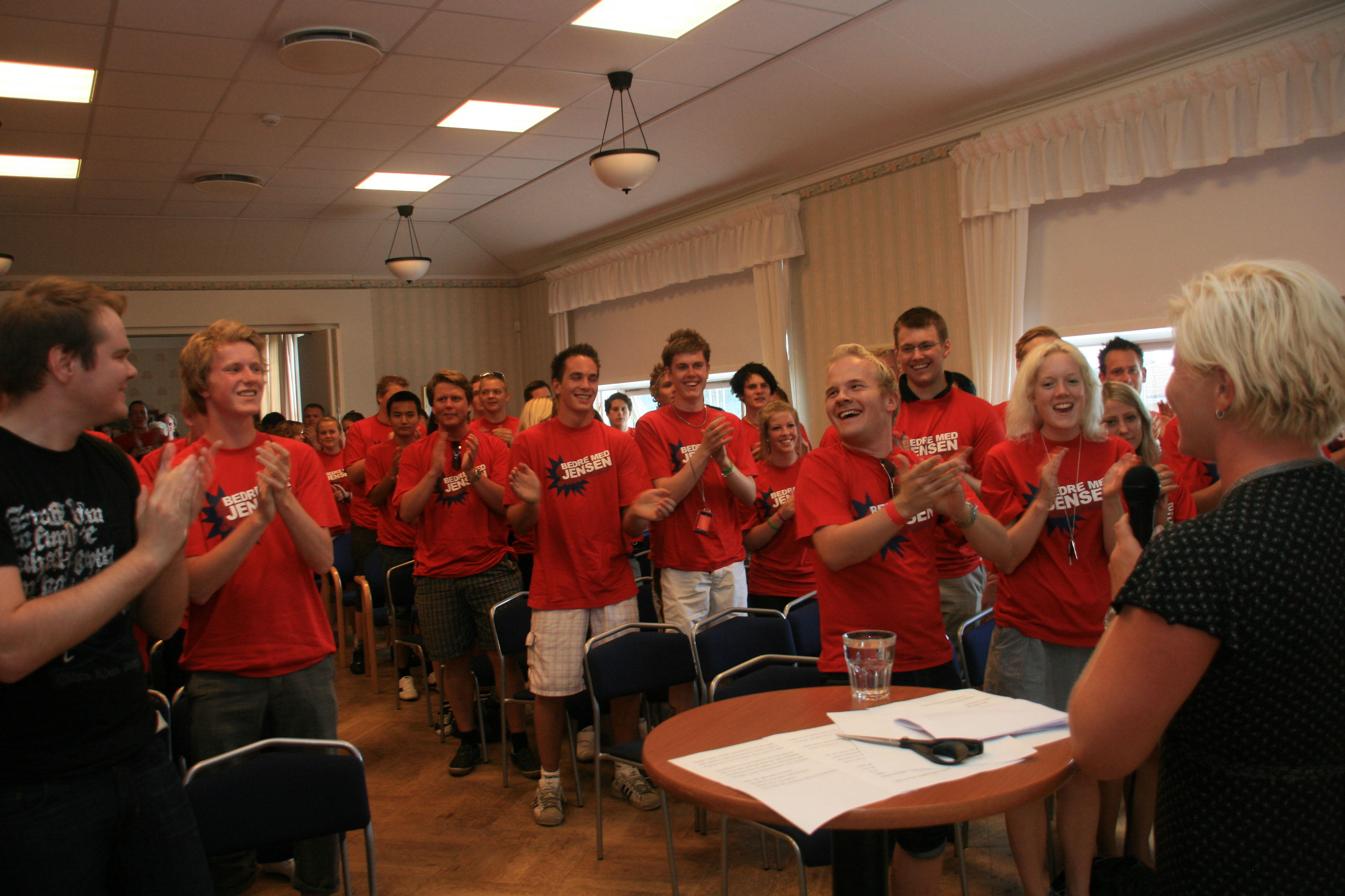 Sommerleir.